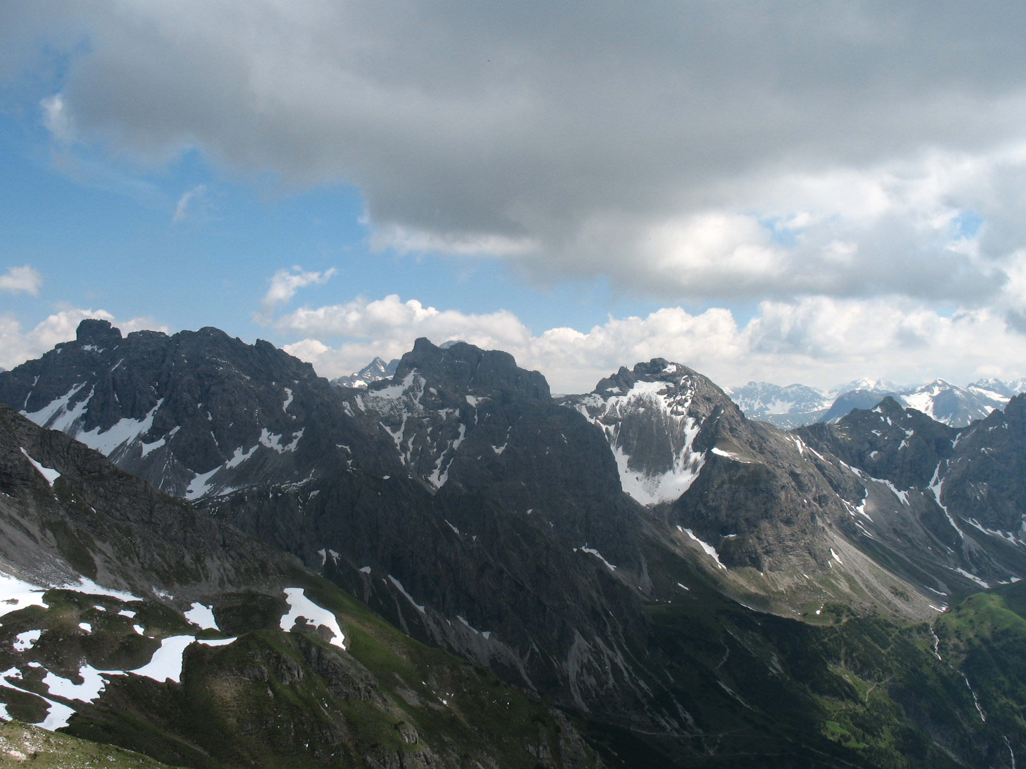 Die Schafalpenköpfe (2320 m, 2302 m, 2272 m) und der Kemptner Kopf (2191 m) vom Abstieg vom Schüsser aus gesehen.